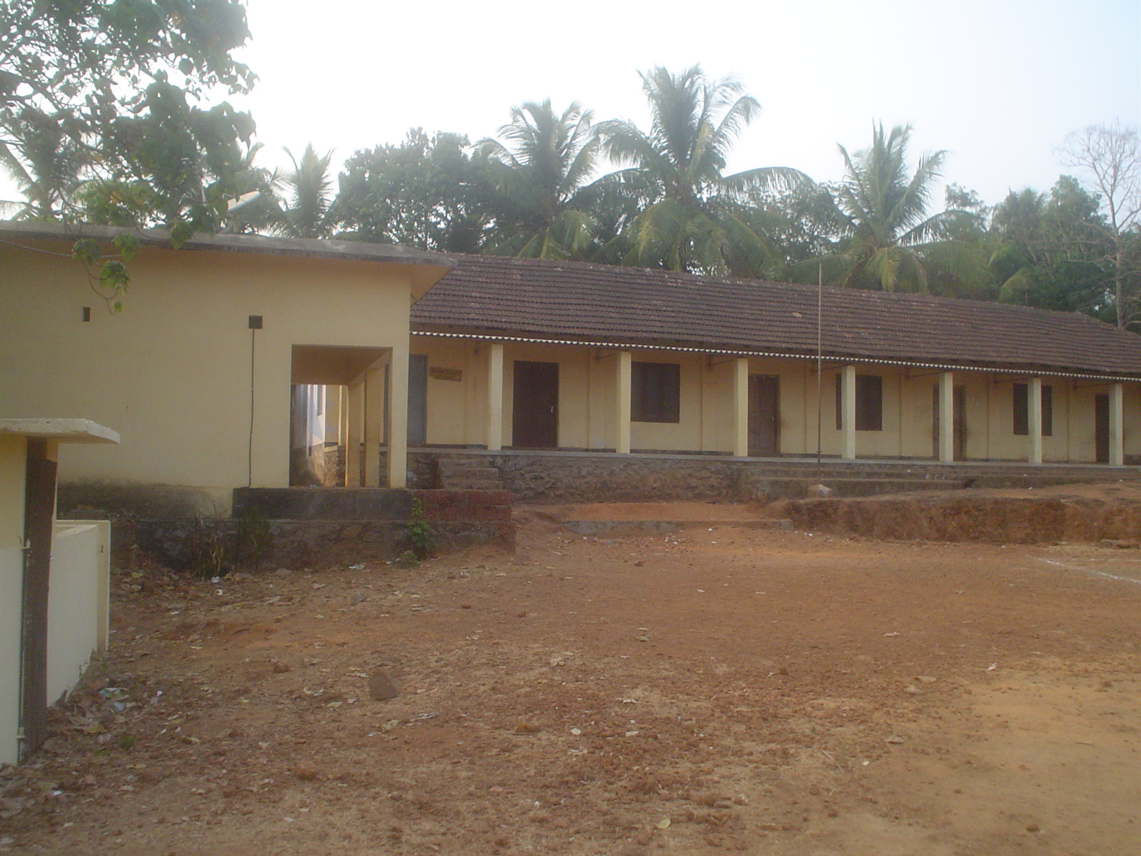 നൊട്ടപ്പുറം എൽ.പി സ്കൂൾ നൊട്ടപ്പുറം പൂച്ചോലമാട്,വേങ്ങര മലപ്പുറം ജില്ല